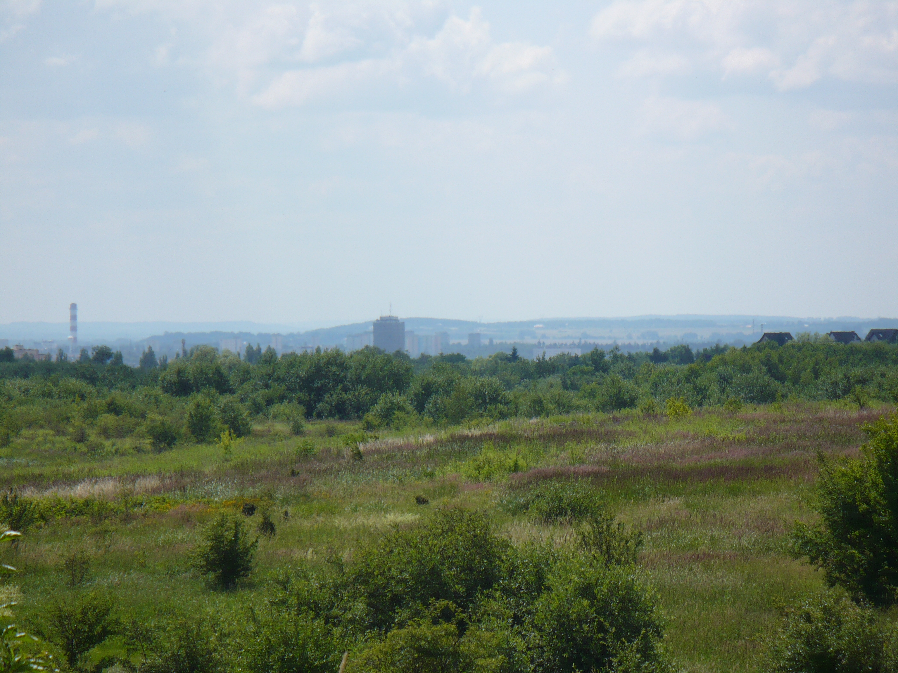 Wzniesienia Szczecińskie (Stettiner Berge) - Wzgórza Warszewskie (I plan) i Wał Stobniański (II plan)